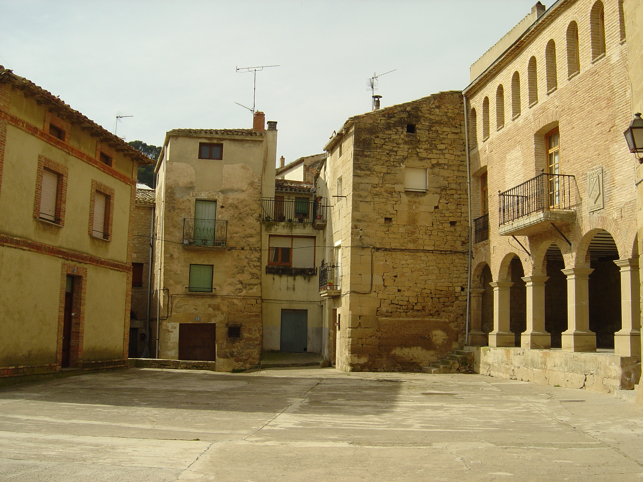 Plaza de Bargota. Navarra. España Cornava own work 29.3.2007 --Cornava 09:47, 30 March 2007 (UTC)